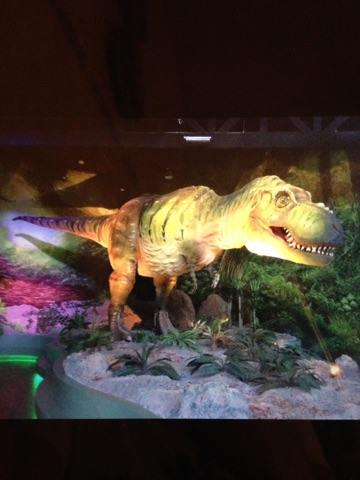 Parte interna del Museo de la Evolución.